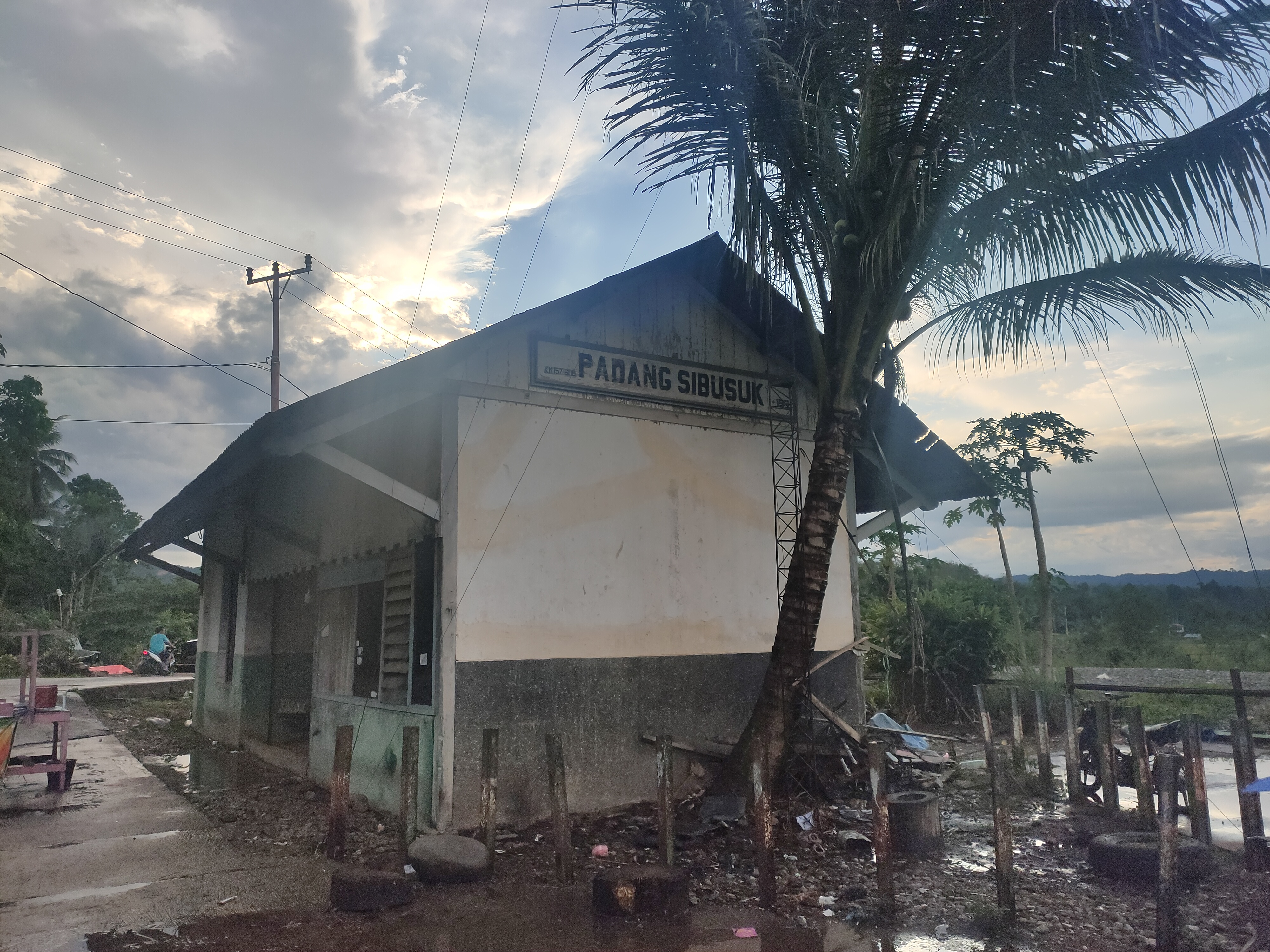 Stasiun Padang Sibusuk pada tahun 2020 di Padang Sibusuk, Kecamatan Kupitan, Kabupaten Sijunjung, Sumatera Barat